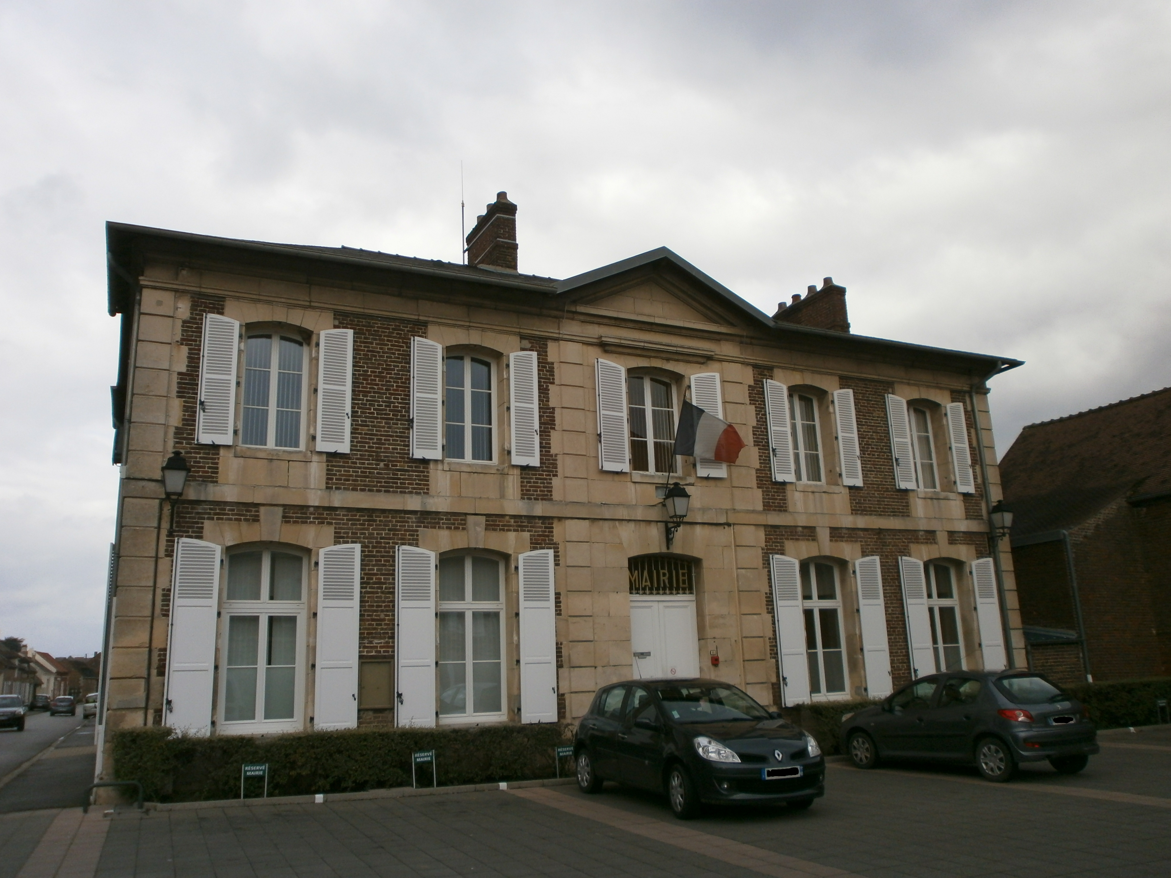 La mairie du Meux